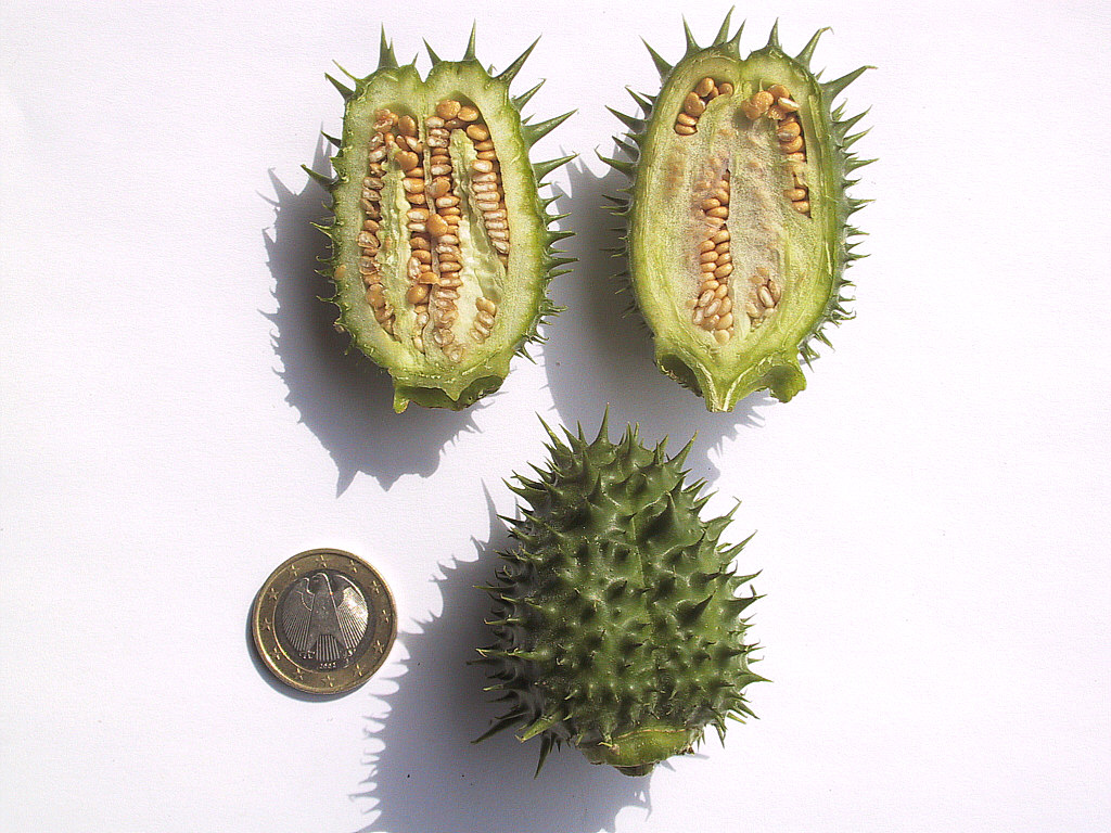 Samenkapsel Datura Stramonium